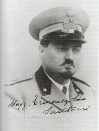 Magg. Ermenegildo Santoni